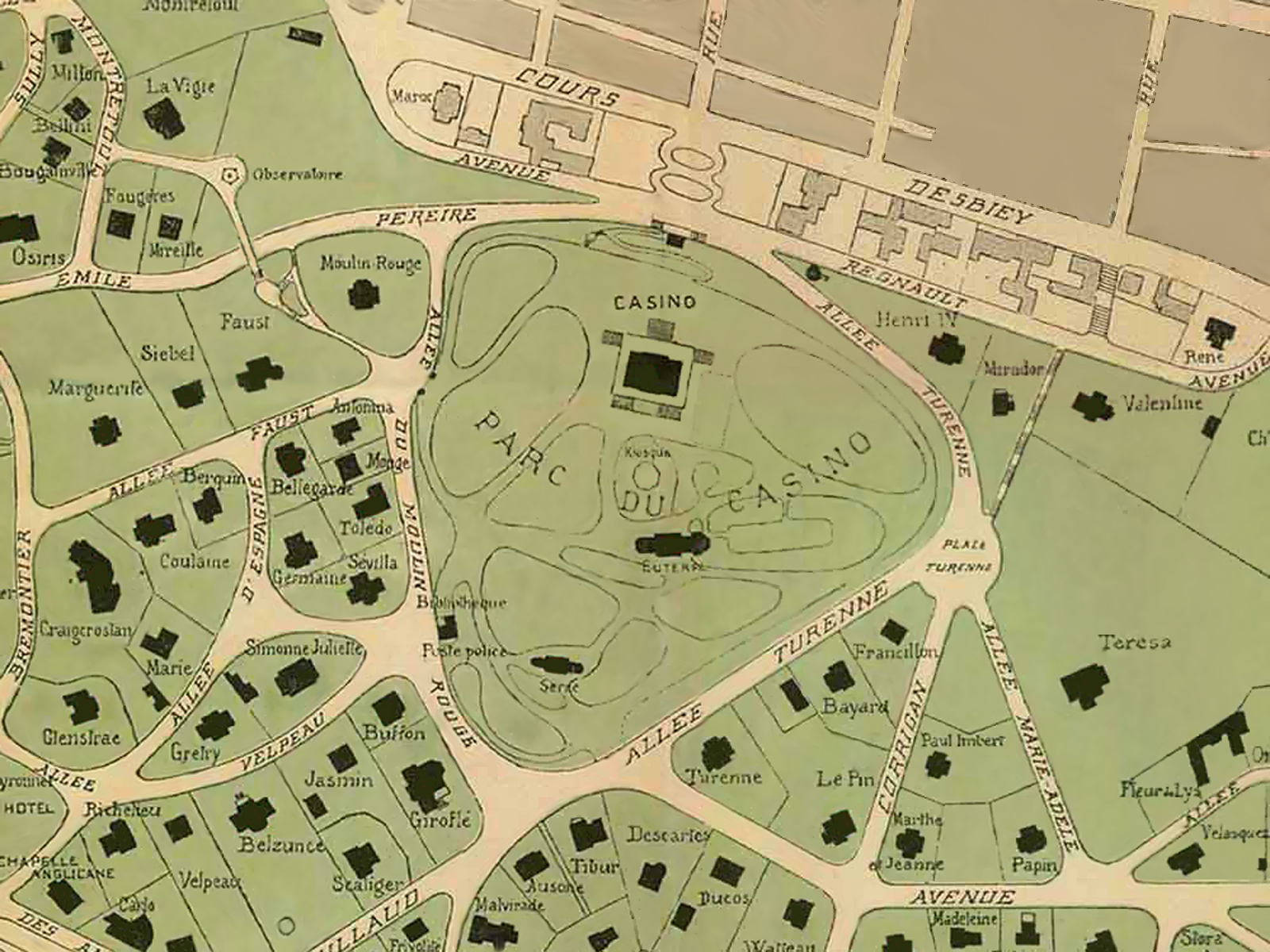 Ausschnitt aus dem Plan der Winterstadt von Arcachon rund um das ehemalige Kasino, heute Parc Mauresque